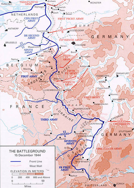 Kort over Vestfronten den 15. december